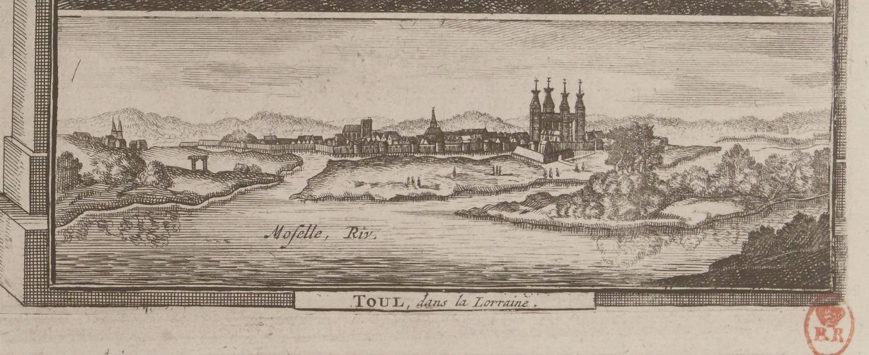 La Galerie agréable du monde, où l'on voit en un grand nombre de cartes très exactes et de belles tailles douces les principaux empires, roïaumes, républiques, provinces, villes, bourgs et forteresses... les îles, côtes, rivières, ports de mer... les antiquitez, les abbayes, églises, académies, collèges, bibliothèques, palais et autres édifices... comme aussi les maisons de campagne, les habillemens et moeurs des peuples... dans les quatre parties de l'univers. Divisée en LXVI tomes, les estampes aiant été dessinées sur les lieux et gravées exactement par les célèbres Luyken, Mulder, Goerée, Baptist, Stopendaal et par d'autres maîtres renomez, avec une courte description qui précède chaque empire, roïaume.... Tome sixième du Roïaume de France. [Provence (suite), Dauphiné, Bourgogne, Champagne, Lorraine] / [Publié par Pieter Vander Aa.]